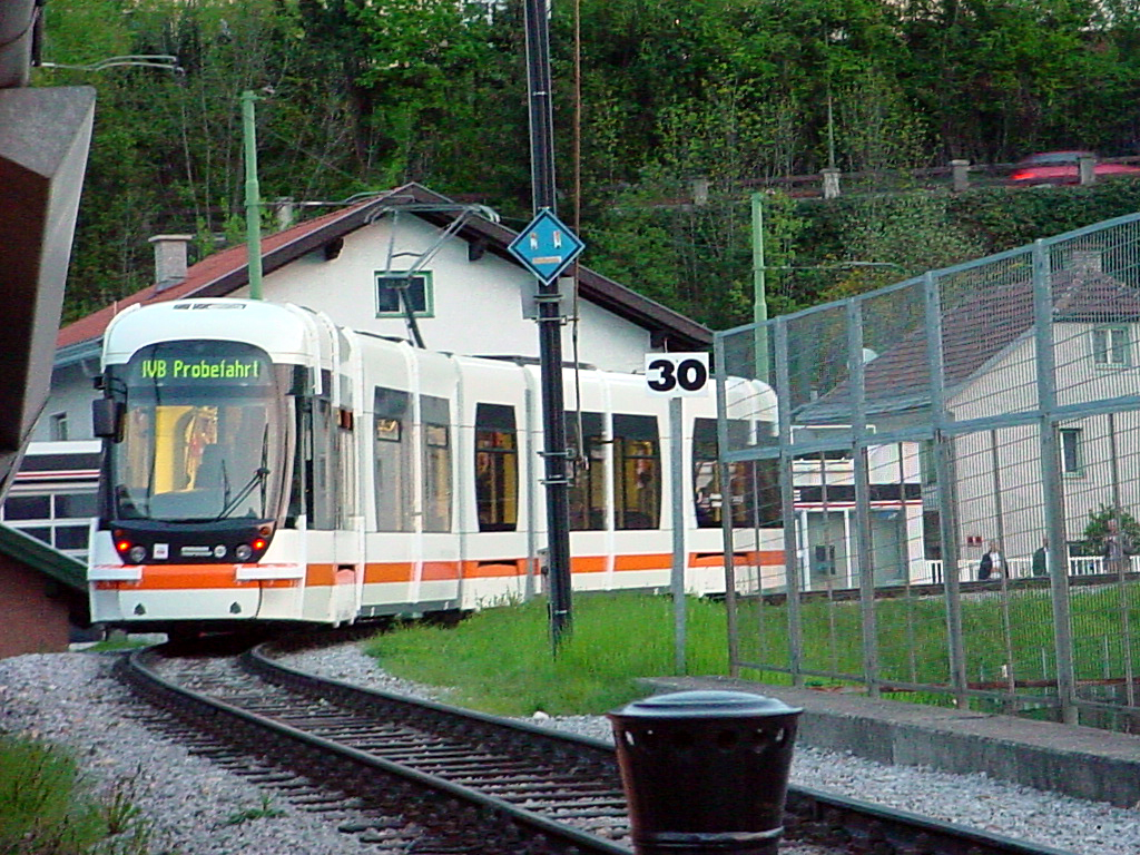 Flexityoutlook-eskisehir-stbtestdrive 20040427 015 wikipedia